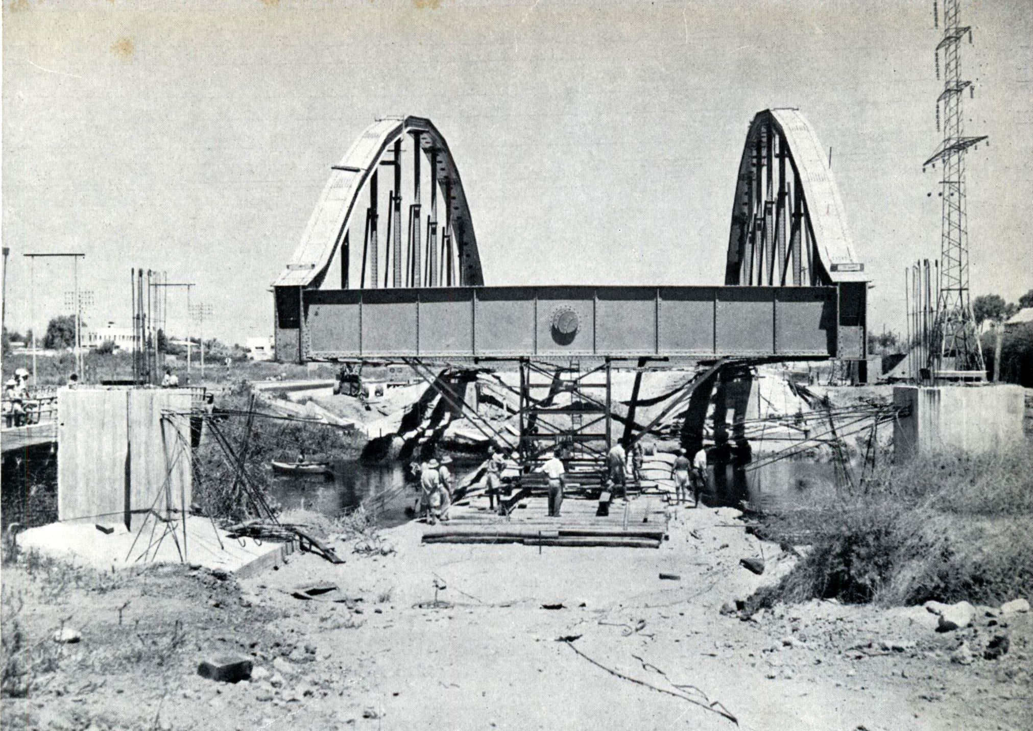 גשר הירקון בכביש תל-אביב-נתניה, בעל שני מסלולים של 7 מטר כל אחד. אי מפריד בן 50 ס"מ רוחב ומדרכות ברוחב 3.65 מטר כל אחת, אורכו 55 מטר. משקל המבנה העליון 1400 טון. נפתח לתנועה ביום 20.3.58. הגשר הורכב על הגדה הצפונית והוזז על גבי סכר בנהר אל הגדה הדרומית.